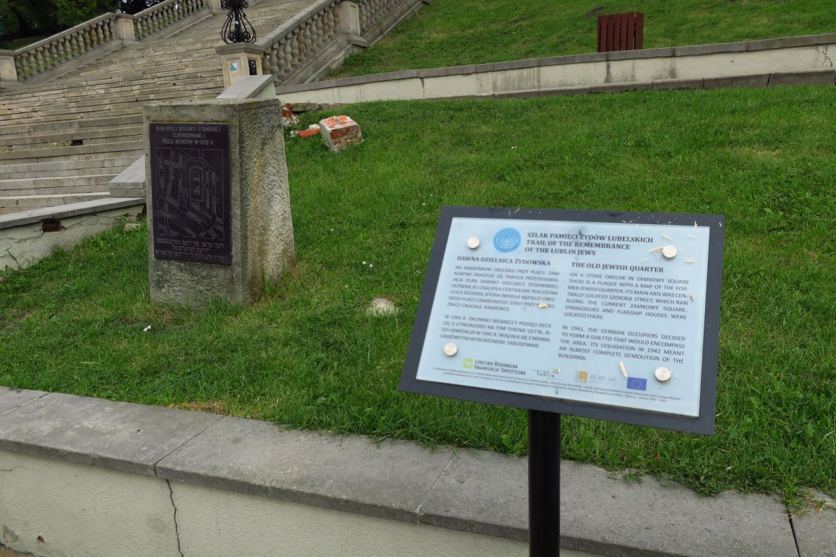 Obelisk przy placu Zamkowym w Lublinie z tablicą upamiętniającą nieistniejącą dzielnicę żydowską oraz tablica z informacją o szlaku pamięci Żydów lubelskich